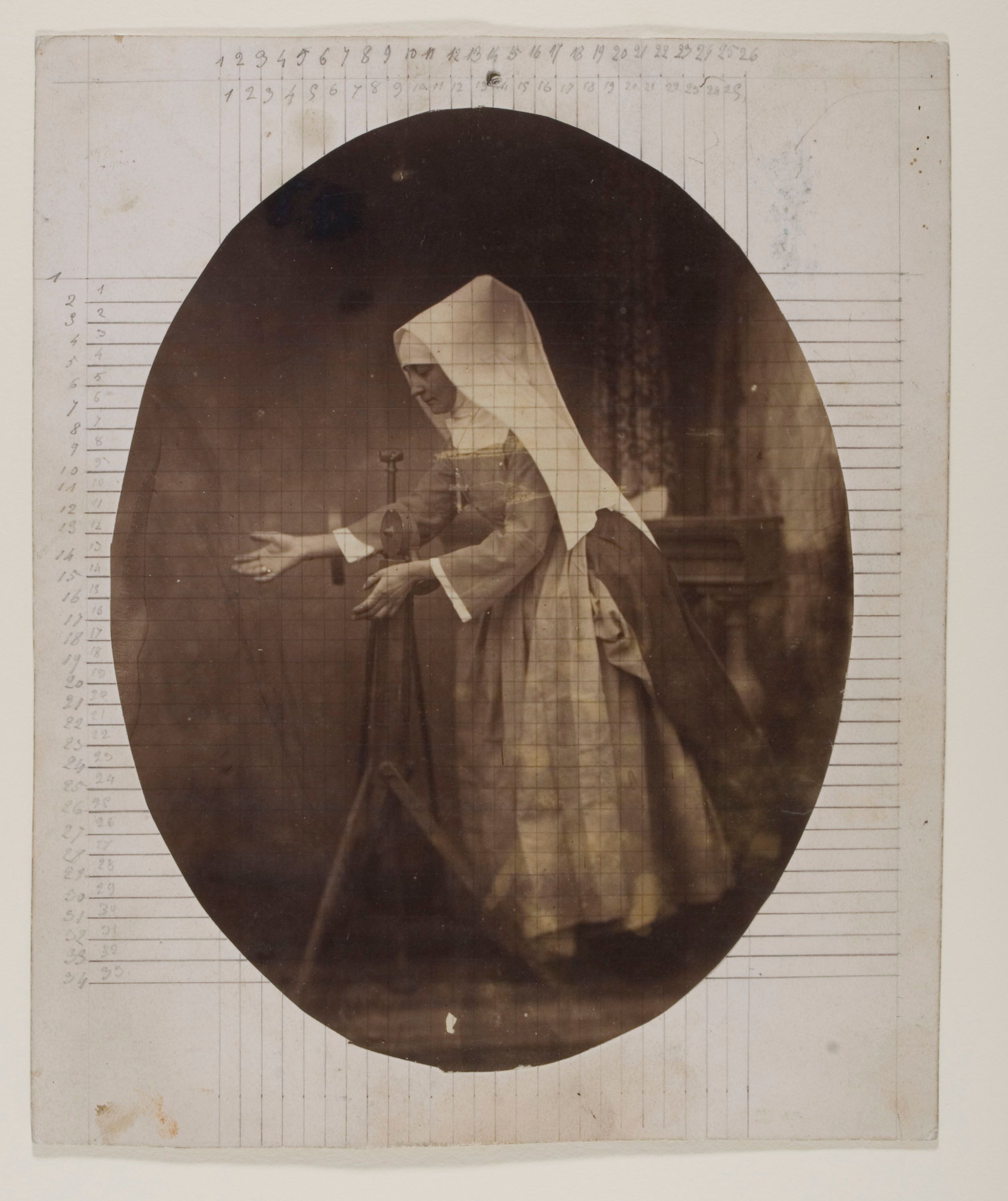 ÉTUDE DE PEINTRE D’APRÈS UNE RELIGIEUSE